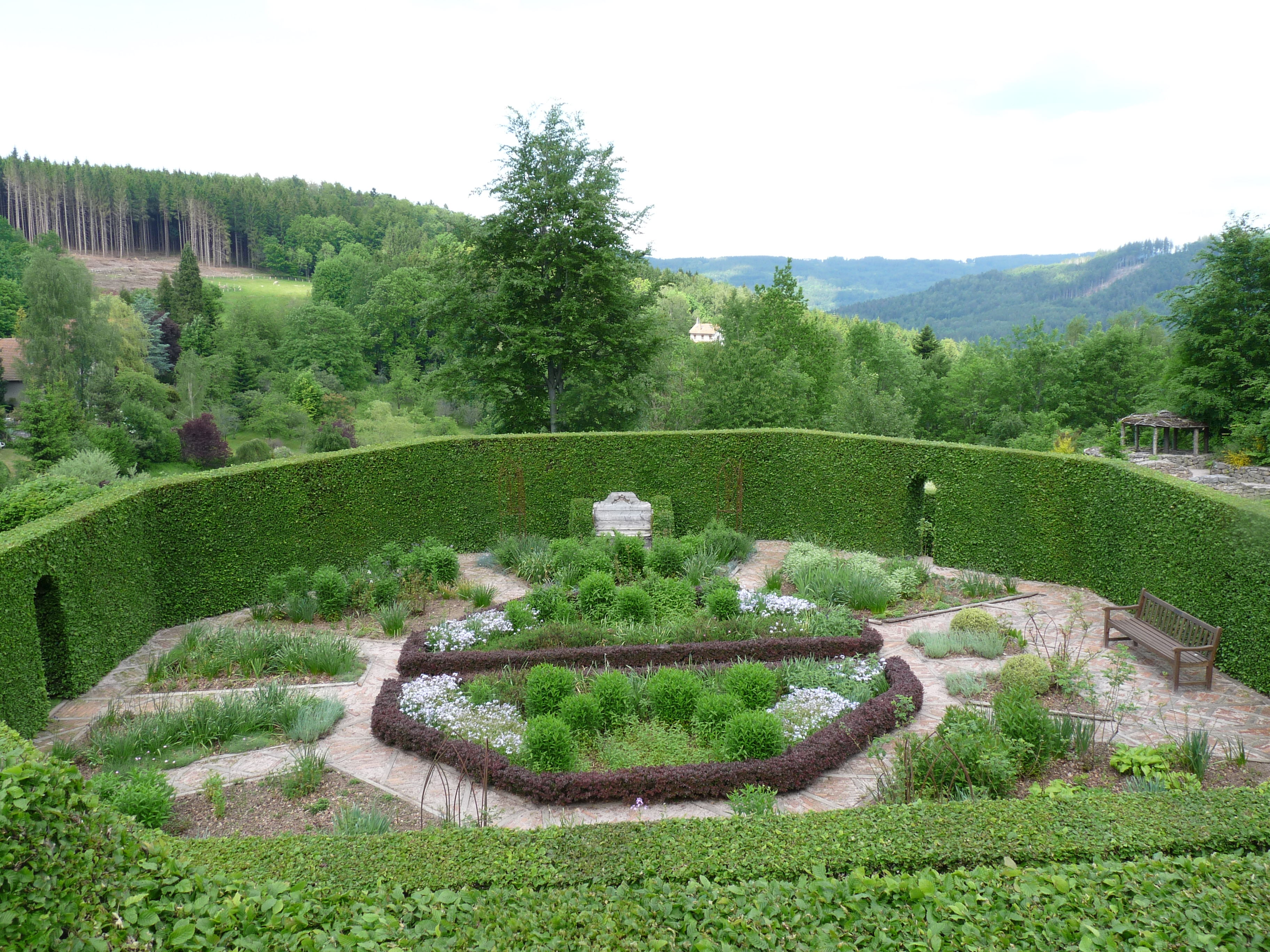 Jardin de Berchigranges (Granges-sur-Vologne, Vosges)